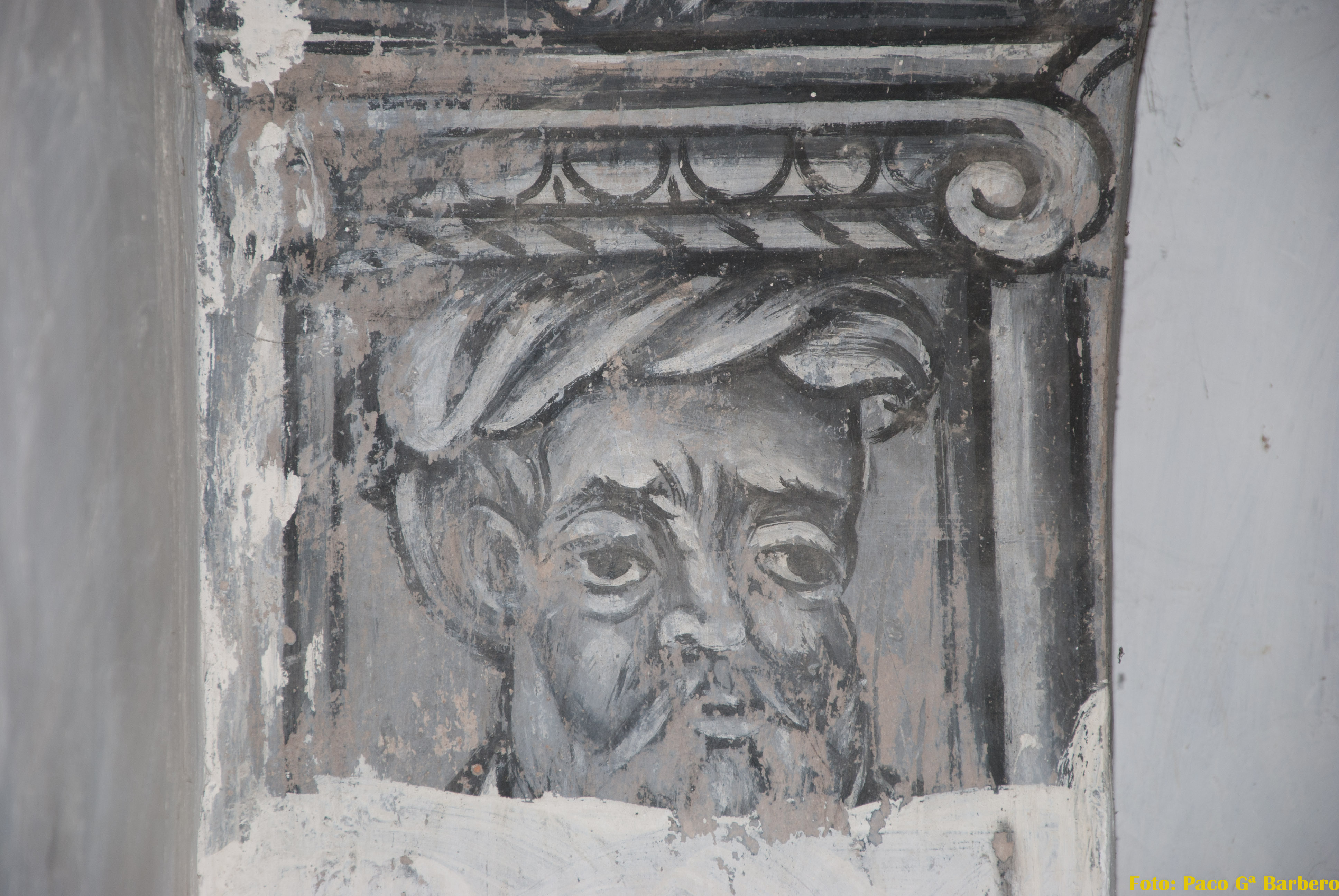 Pintura de un rostro del siglo XVI de la capilla de casa Mur de Aluján